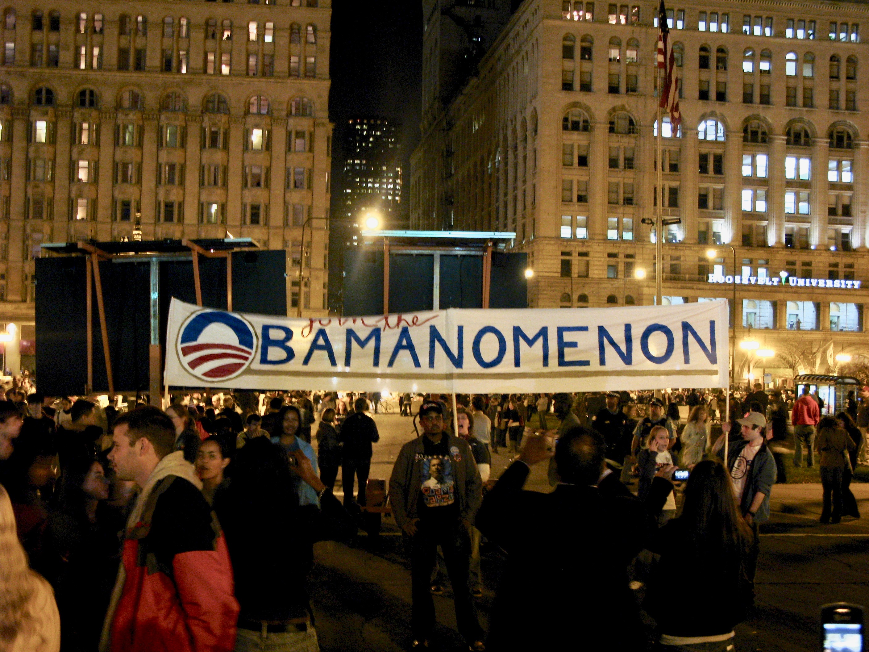 OBAMANOMENON